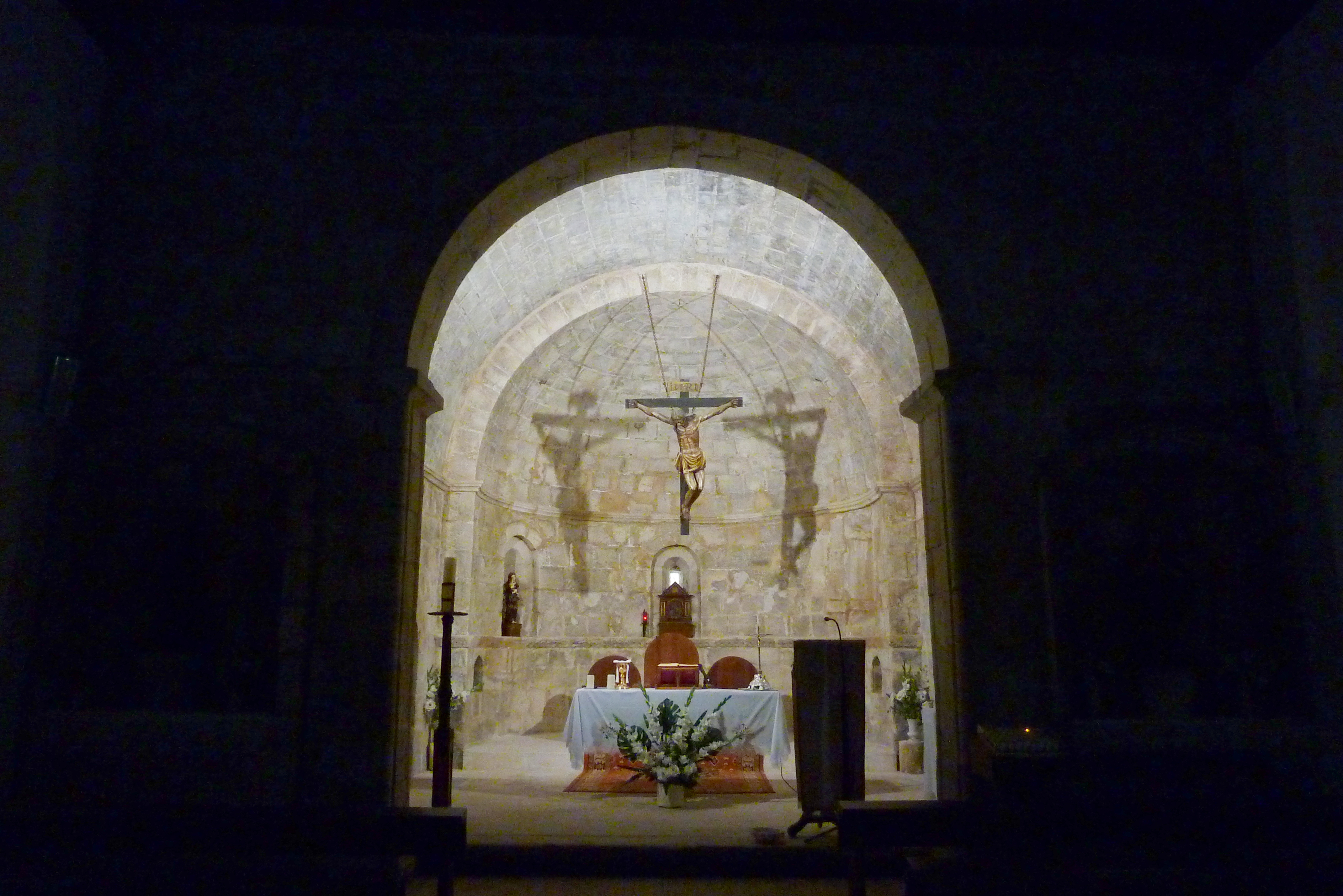 Kirche San Bartolomé in Campisábalos in der Provinz Guadalajara in Spanien